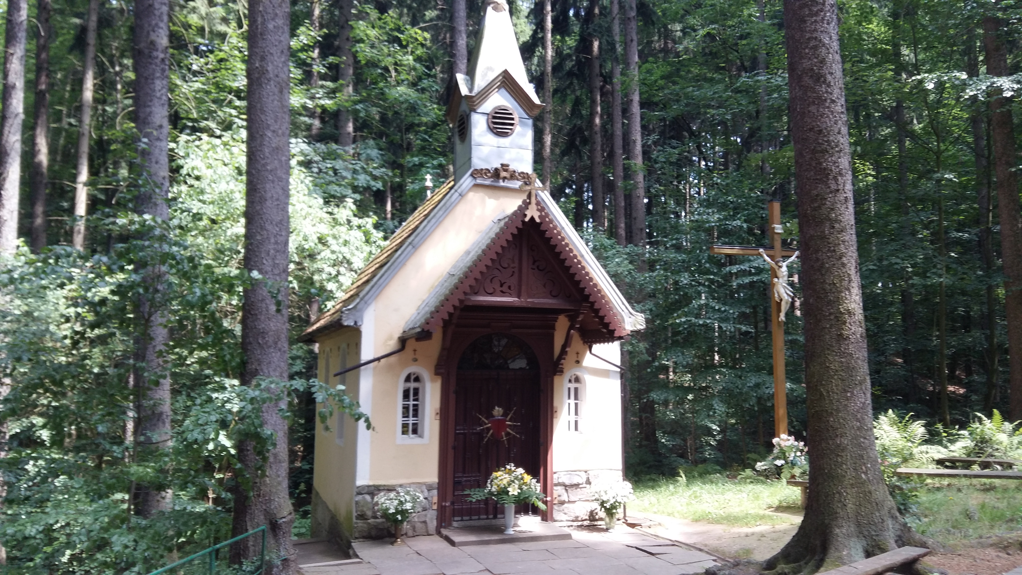 XIX-wieczna kapliczka przy Źródełku Maryi w Kudowie-Słone.